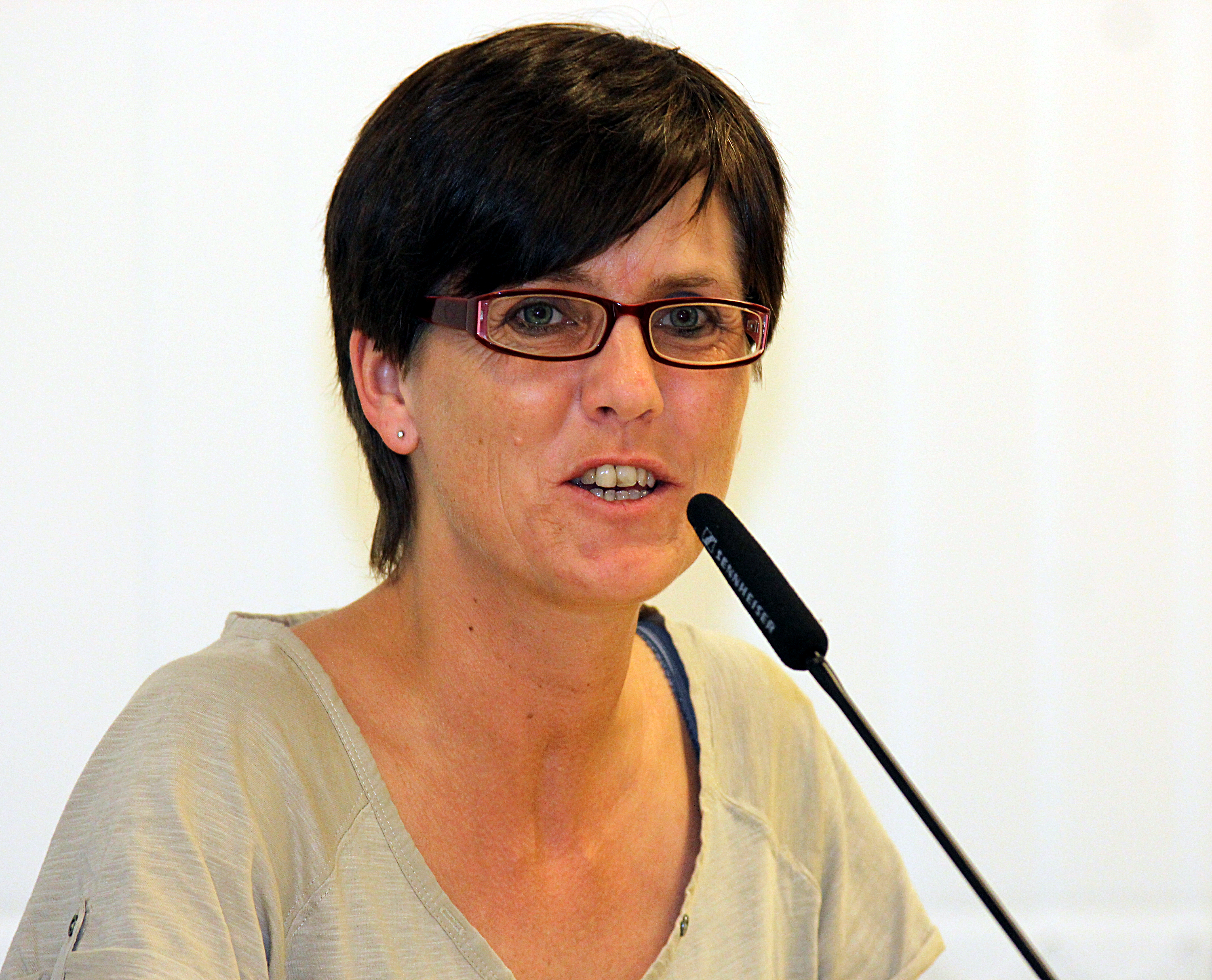 Inge_Hannemann in Gelsenkirchen (Mai 2013)